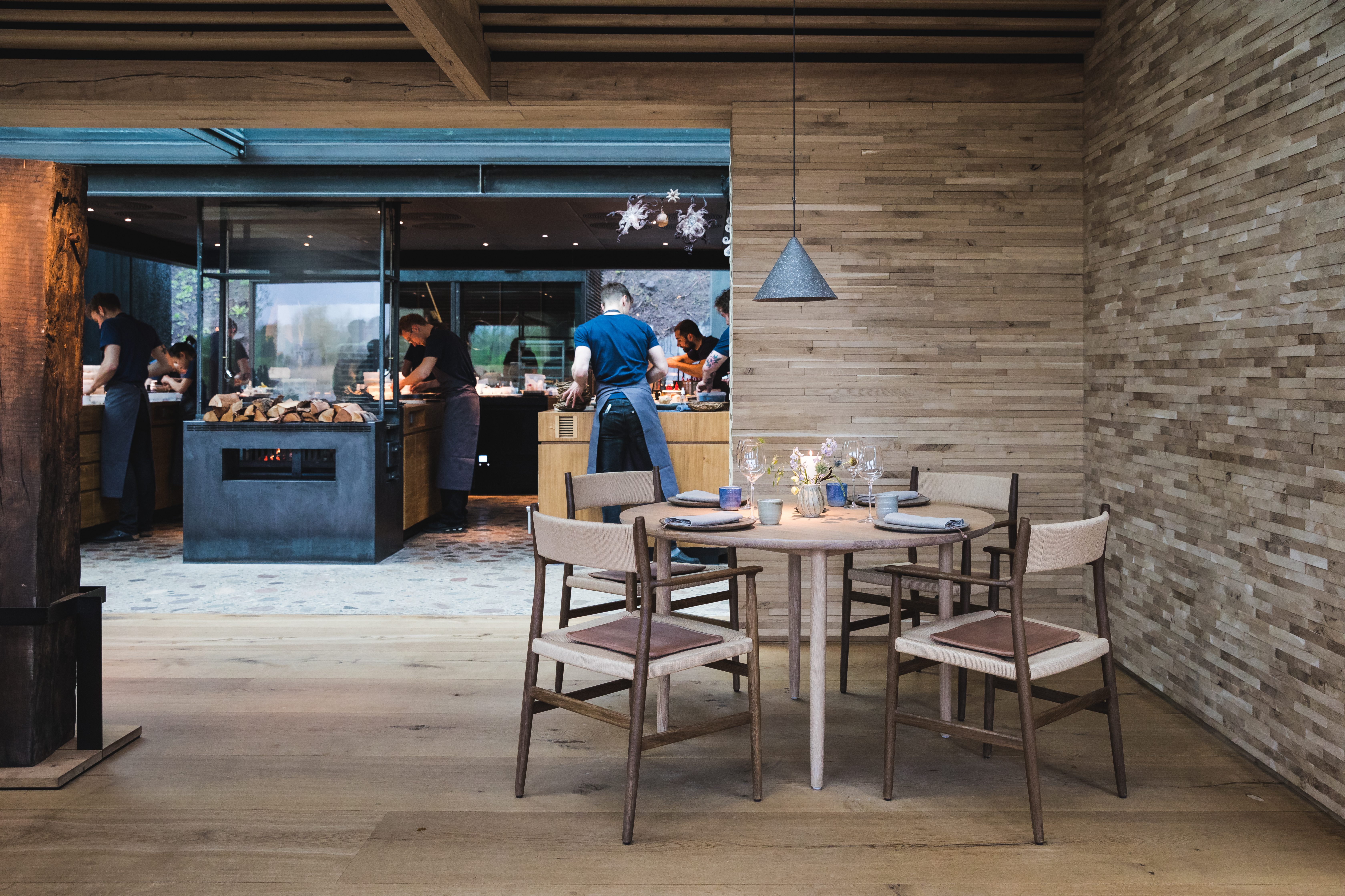 AV4A6178